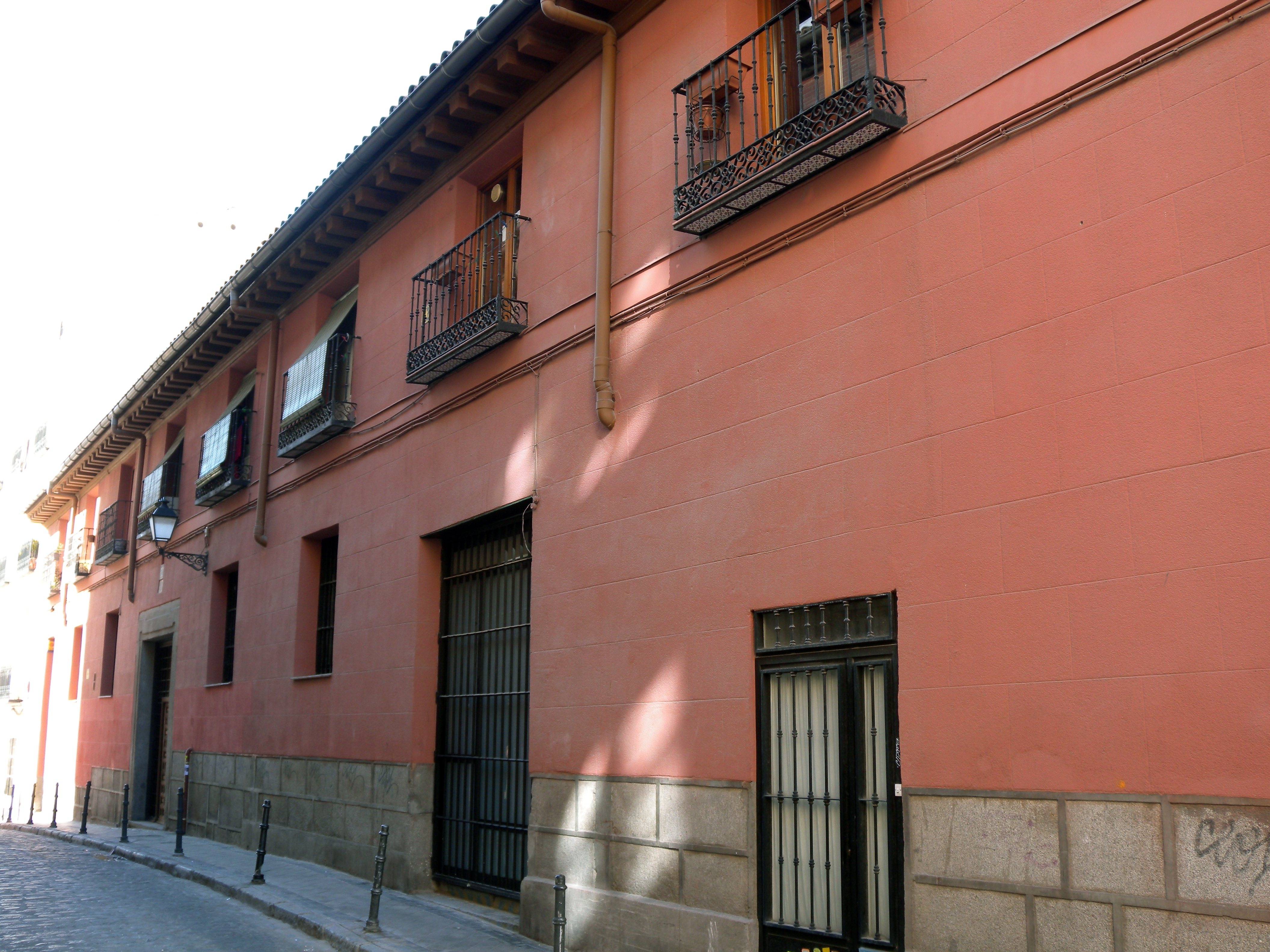 Fachada principal de una casa a la malicia situada en la calle de la Redondilla de Madrid